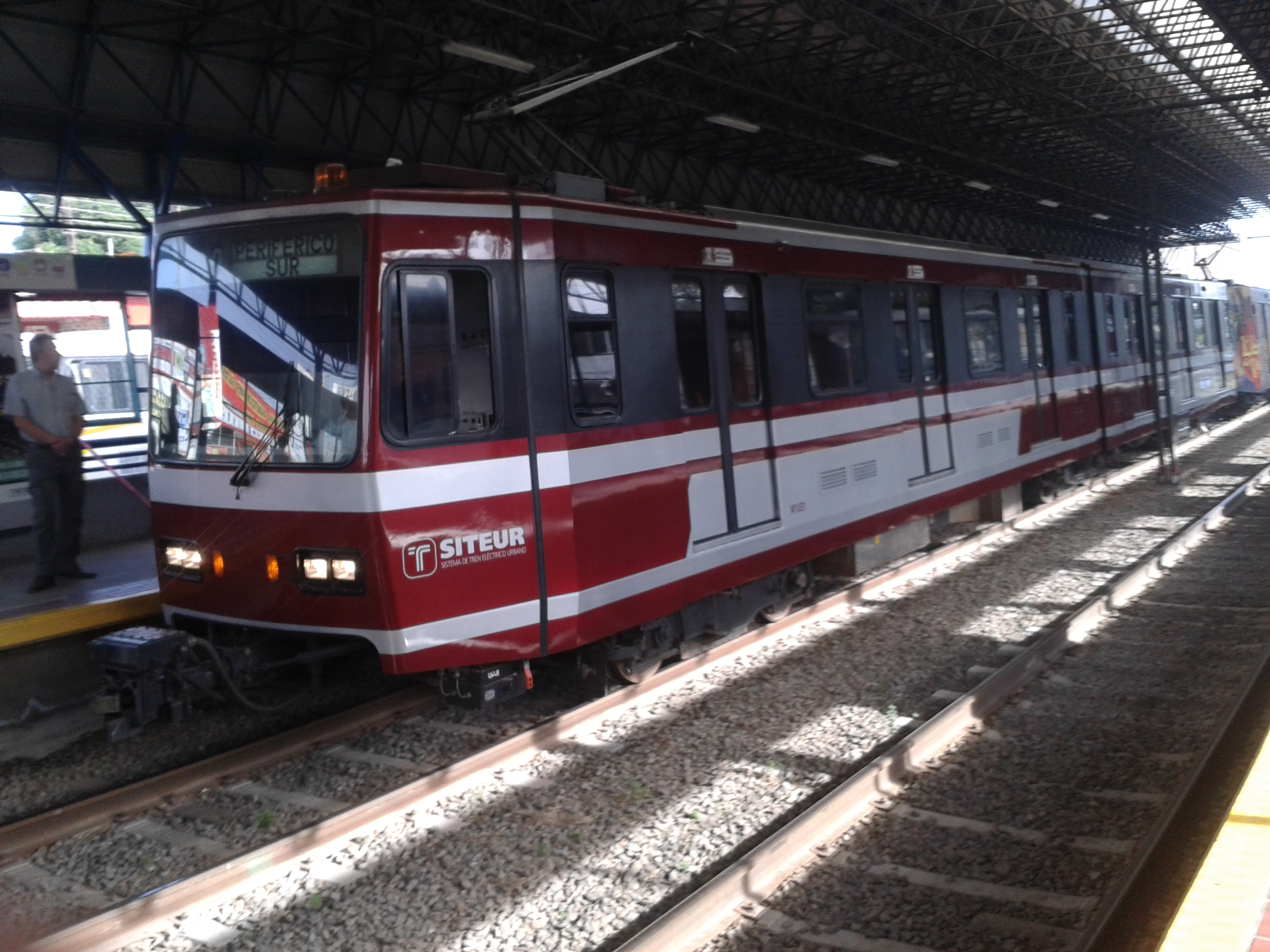 Un vagón del Tren Ligero de Guadalajara en la estación Isla Raza